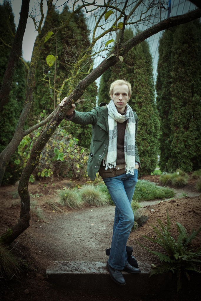 Näitleja Nero Urke novembris 2010 TÜ botaanikaaias.